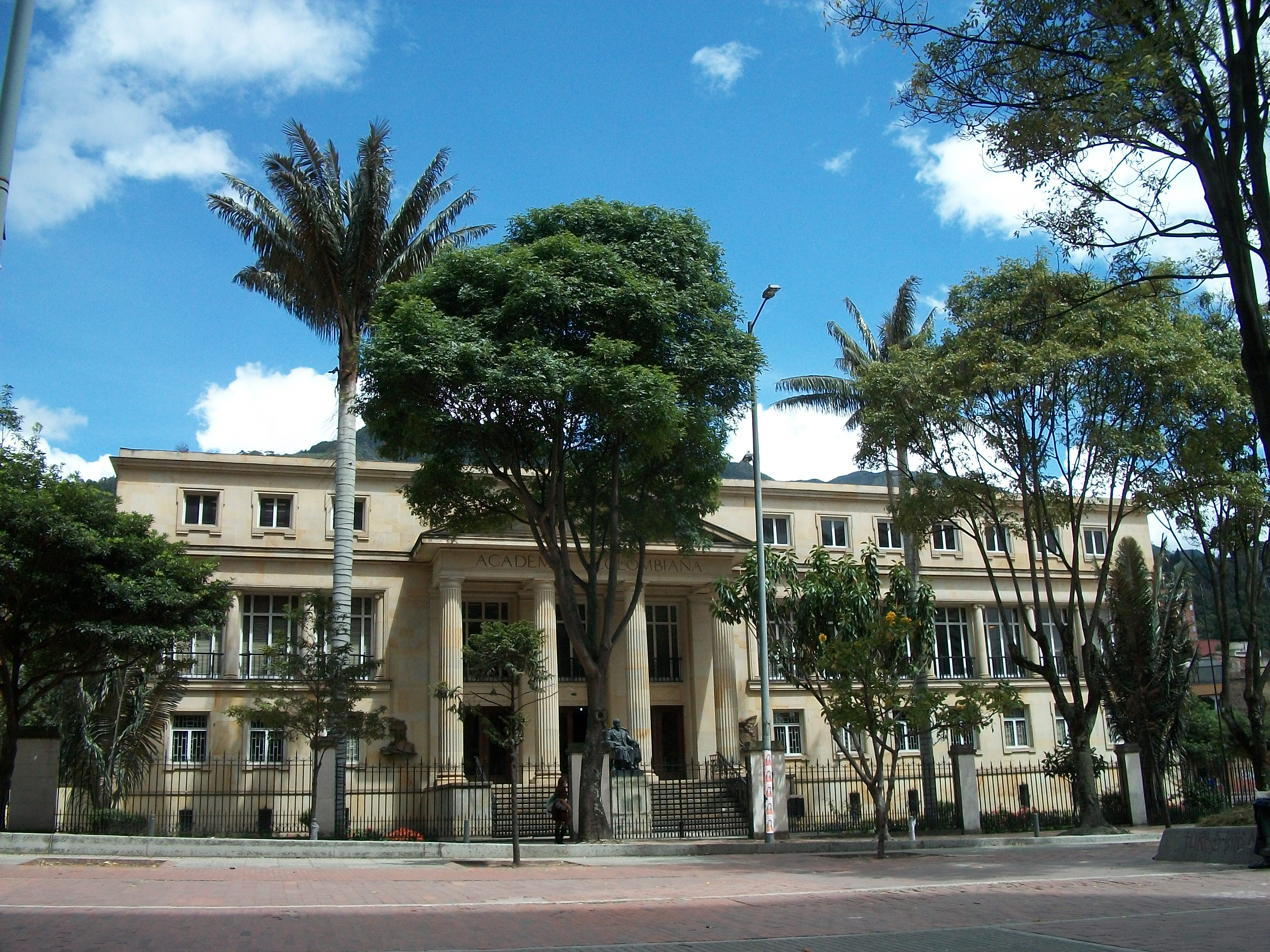 Fachada de la Academia Colombiana de la Lengua, costado occidental del edificio.